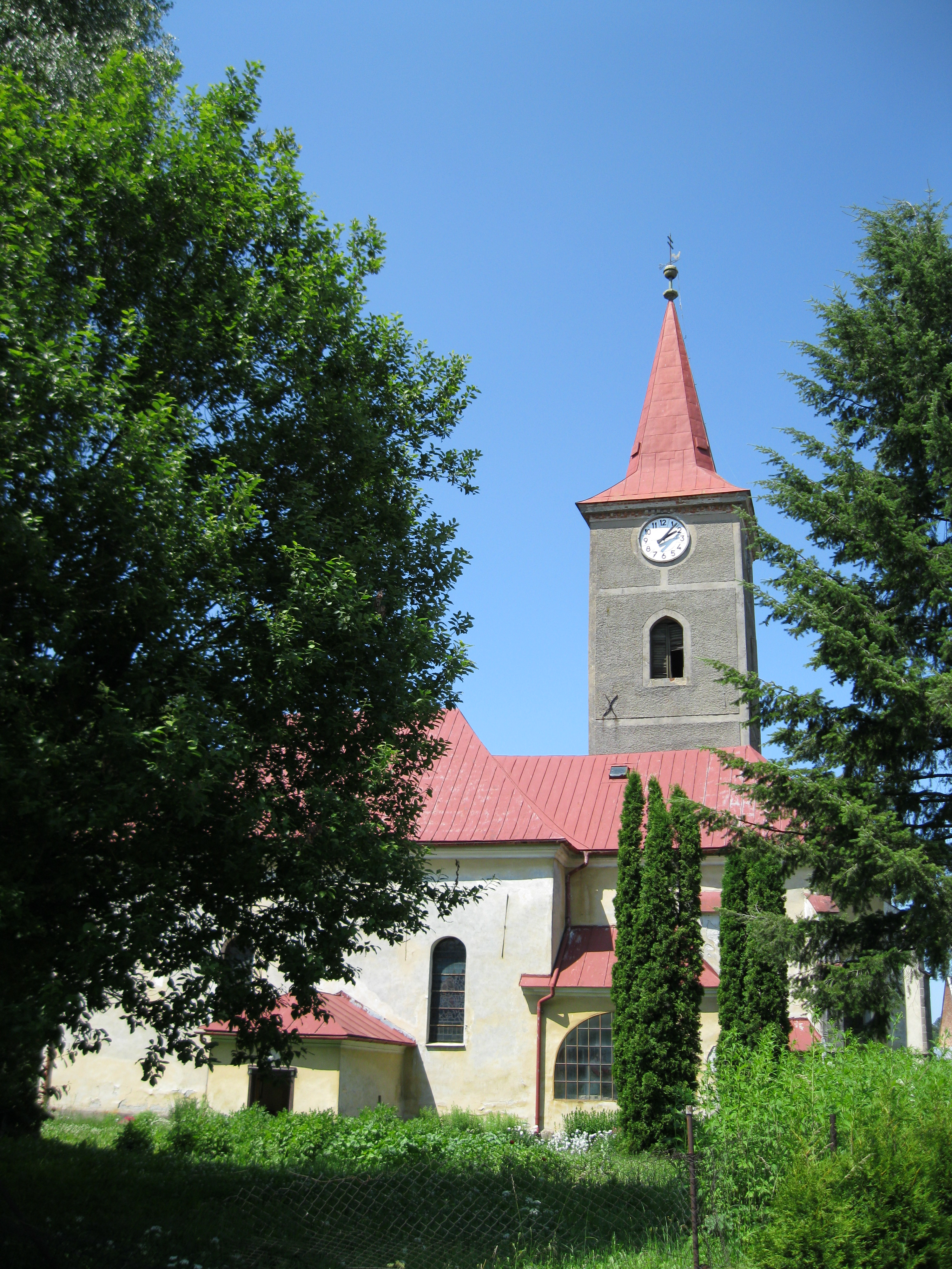 Kostel sv. Jiljí (Huzová)